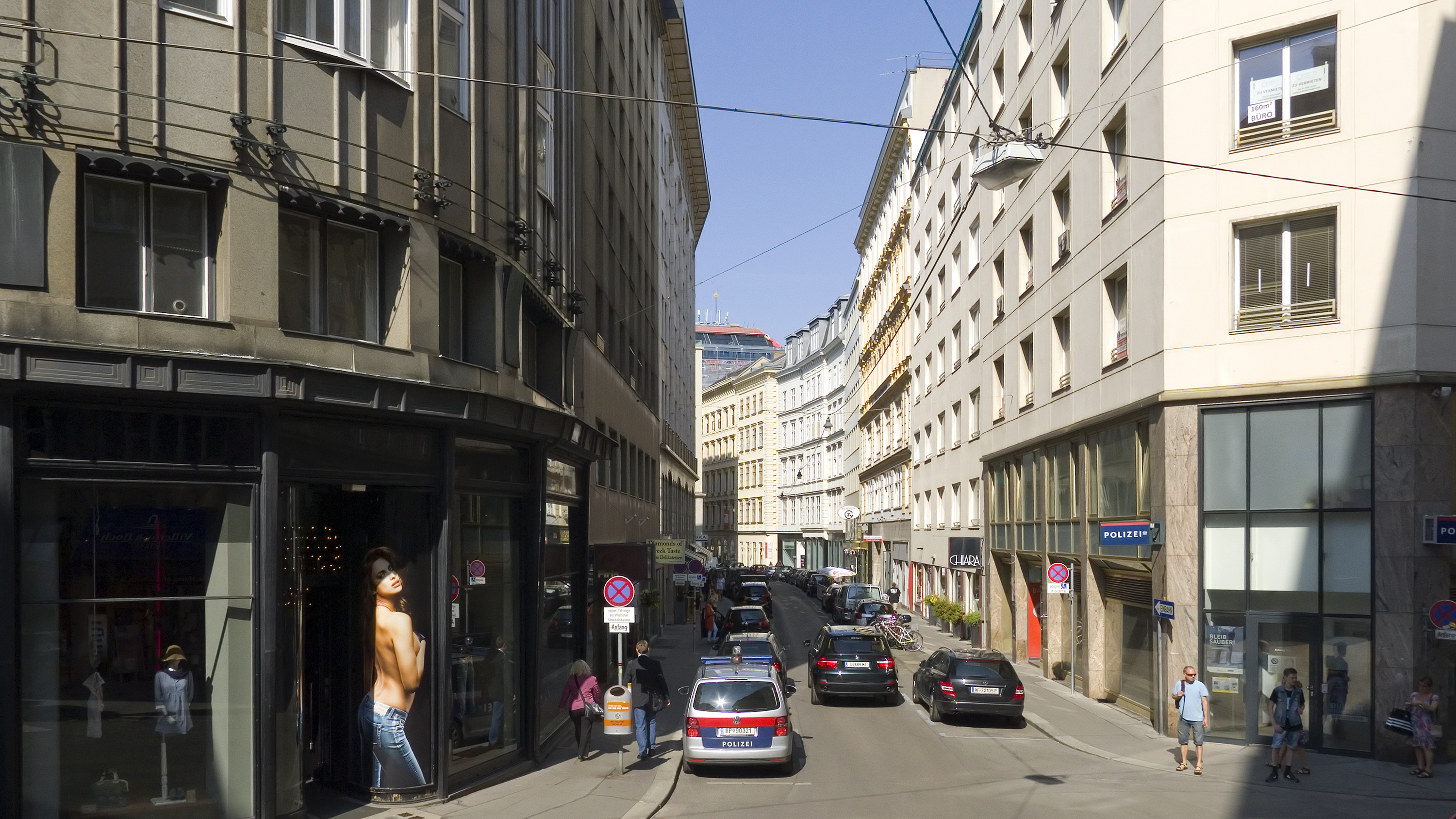 Bauernmarkt in Wien 1 bei der Brandstätte Richtung Nordosten